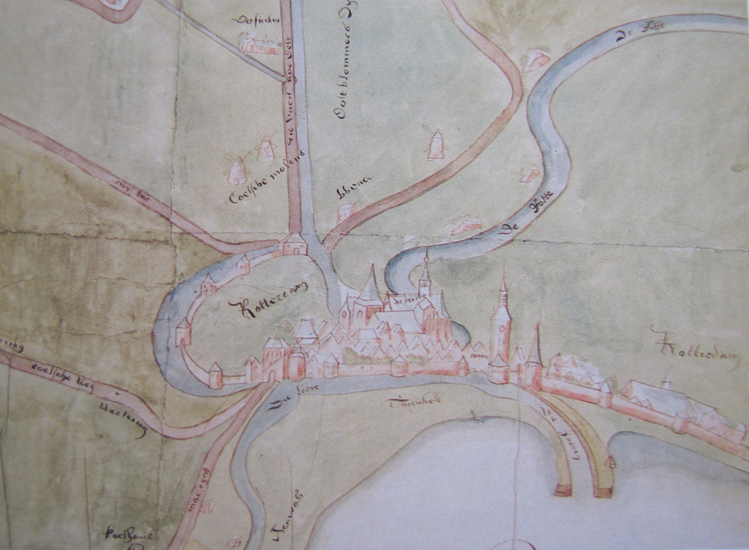 Dessin de Rotterdam en 1540 par l'artiste Cornelis Cornelisz de Schilder.Les bâtiments centraux sont sur l'actuel Blaak et Groenendaal. Les tours de l'église ne sont pas encore construites. A droite de l'église, l'hôtel de ville et ses tours. Tout à droite, le couvent dominicain.